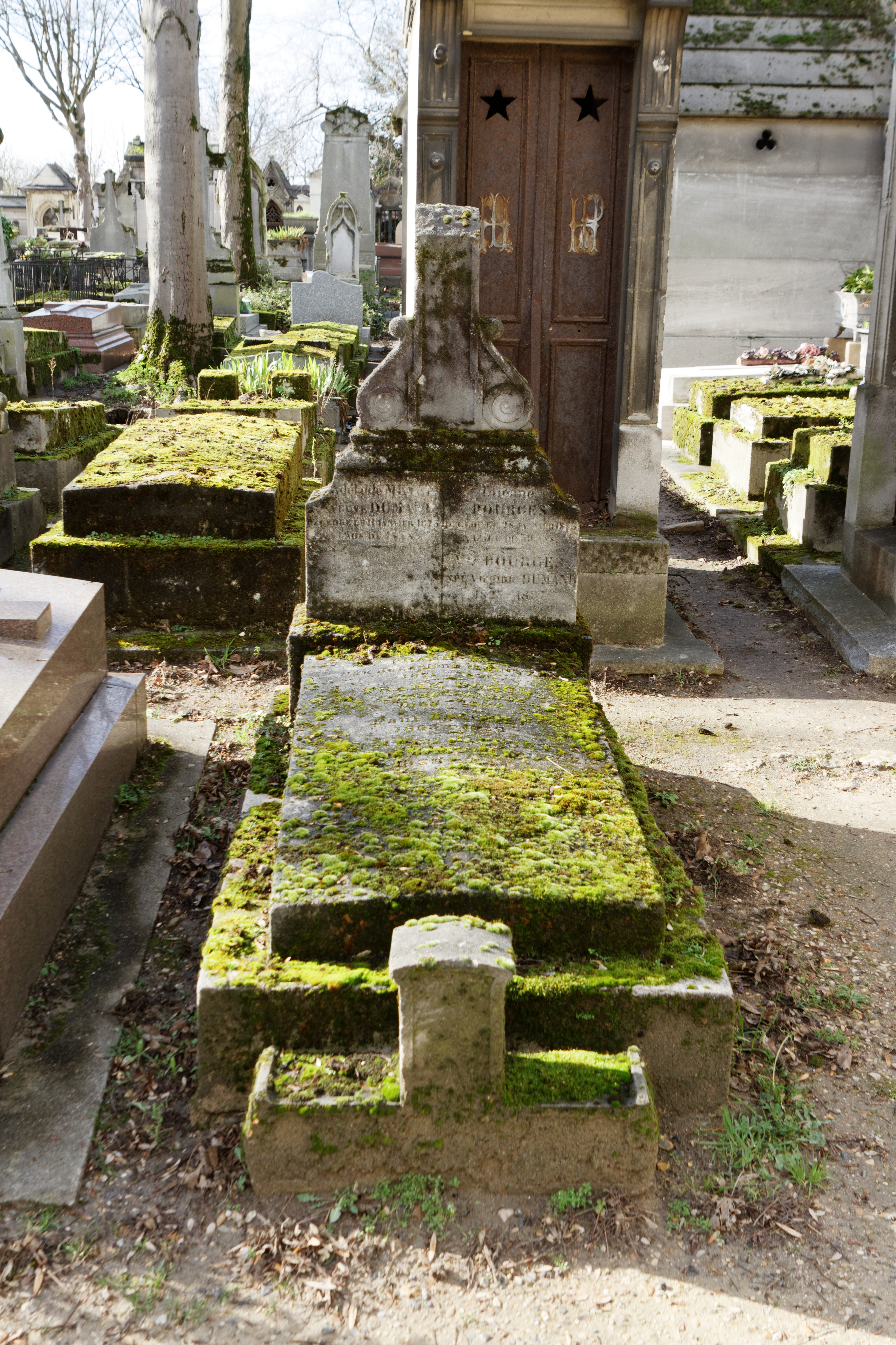 Sépulture de Frank Boggs (1855-1926), peintre français d'origine américaine ; Frank-Will (1900-1950), fils de Frank Boggs et peintre.